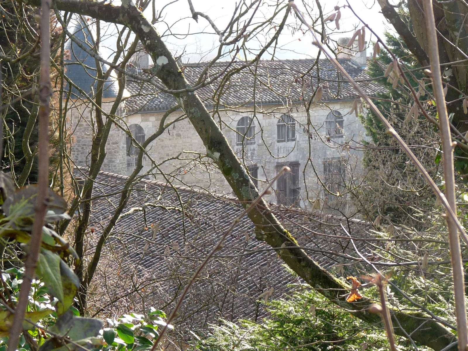 logis du Petit Chalonne, Fléac, Charente, France